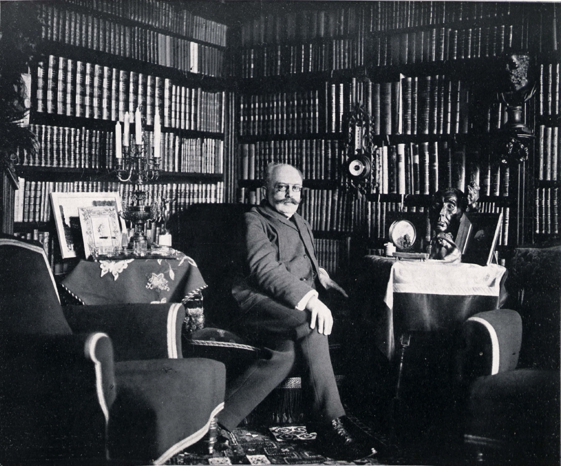 Felix Philippi, deutscher Schriftsteller.